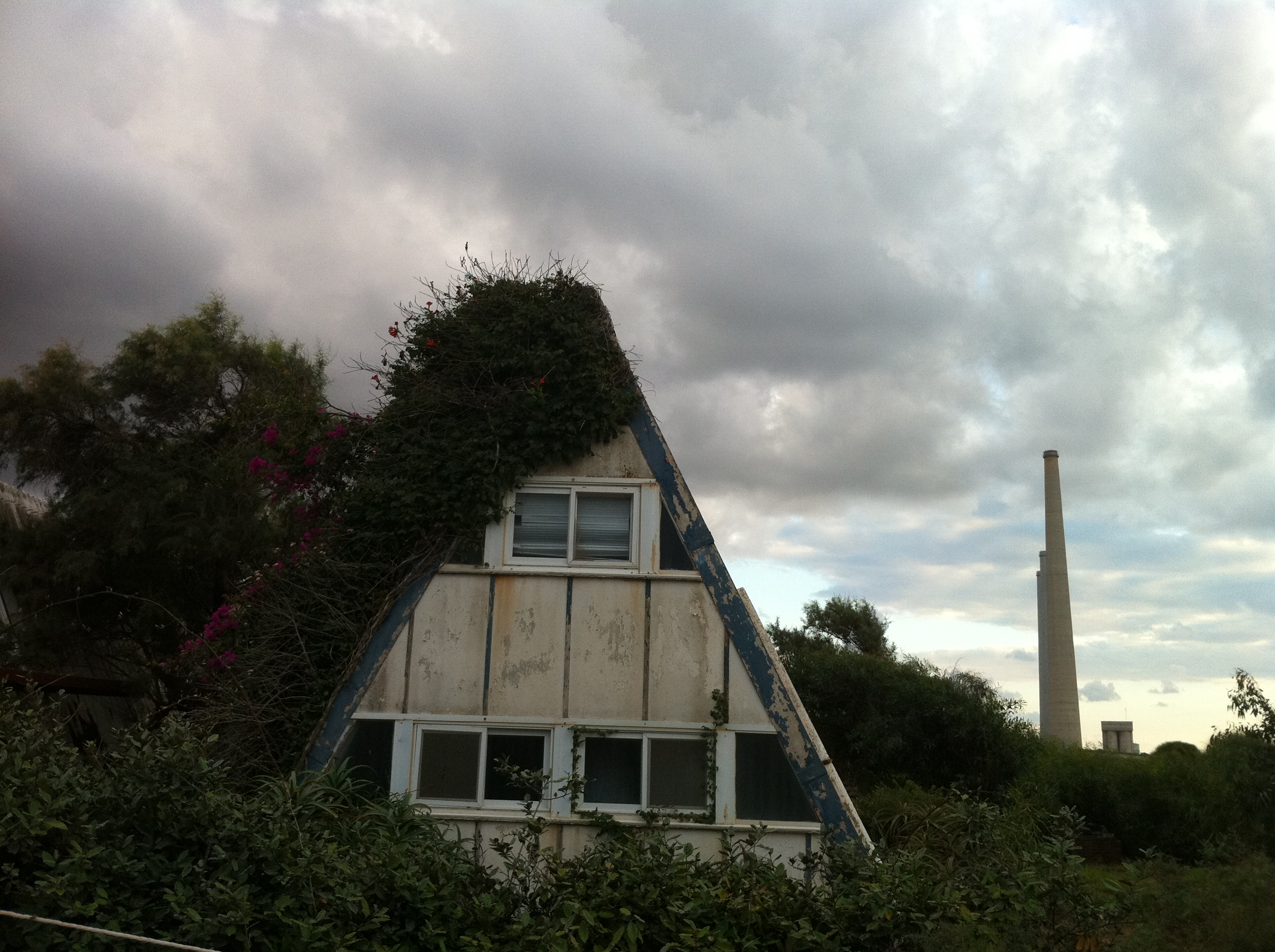 בית בשכונת המשולשים